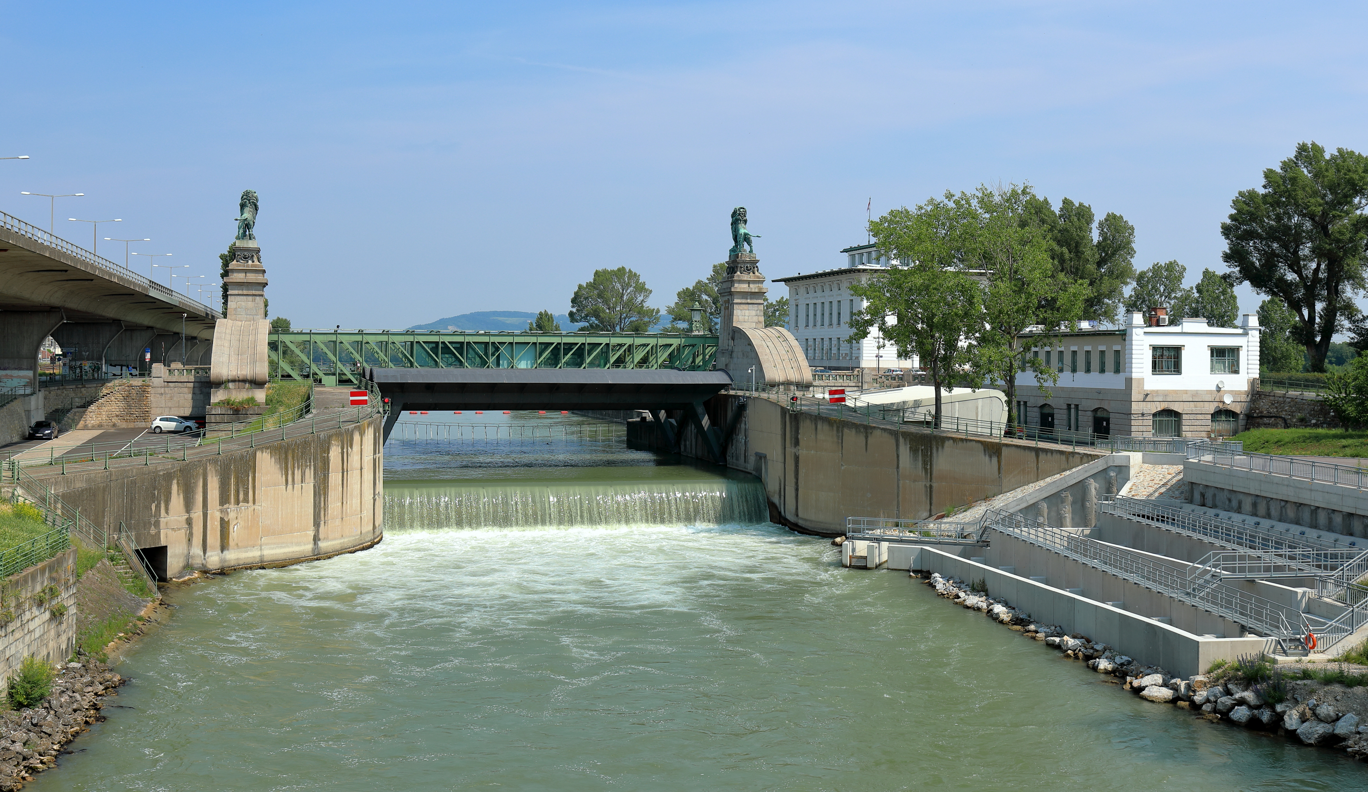 Die Nussdorfer Wehranlage an der Grenze zwischen dem 20. Wiener Gemeindebezirk Brigittenau und dem 19. Gemeindebezirk Döbling.Die Wehranlage wurde von Otto Wagner entworfen und von 1894 bis 1898 errichtet. Sie besteht aus der eigentlichen Wehr, die mehrfach umgebaut wurde, der Schemerlbrücke, dem Verwaltungsgebäude für die „Donau-Regulierungs-Commission“ und dem sogenannten „Kettenmagazin-Gebäude“ (ganz rechts). 2004/2005 wurde ein Kleinkraftwerk mit 12 Matrix-Turbinen in die Wehr eingebaut (das Technikgebäude tw. sichtbar vor dem Verwaltungsgebäude). Ganz rechts eine Fischwanderhilfe, die 2017 eröffnet wurde, und ganz links die Hochtrasse der Klosterneuburger Straße (B14), die von 1981 bis 1983 von der Baufirma H. Rella & Co. errichtet wurde.